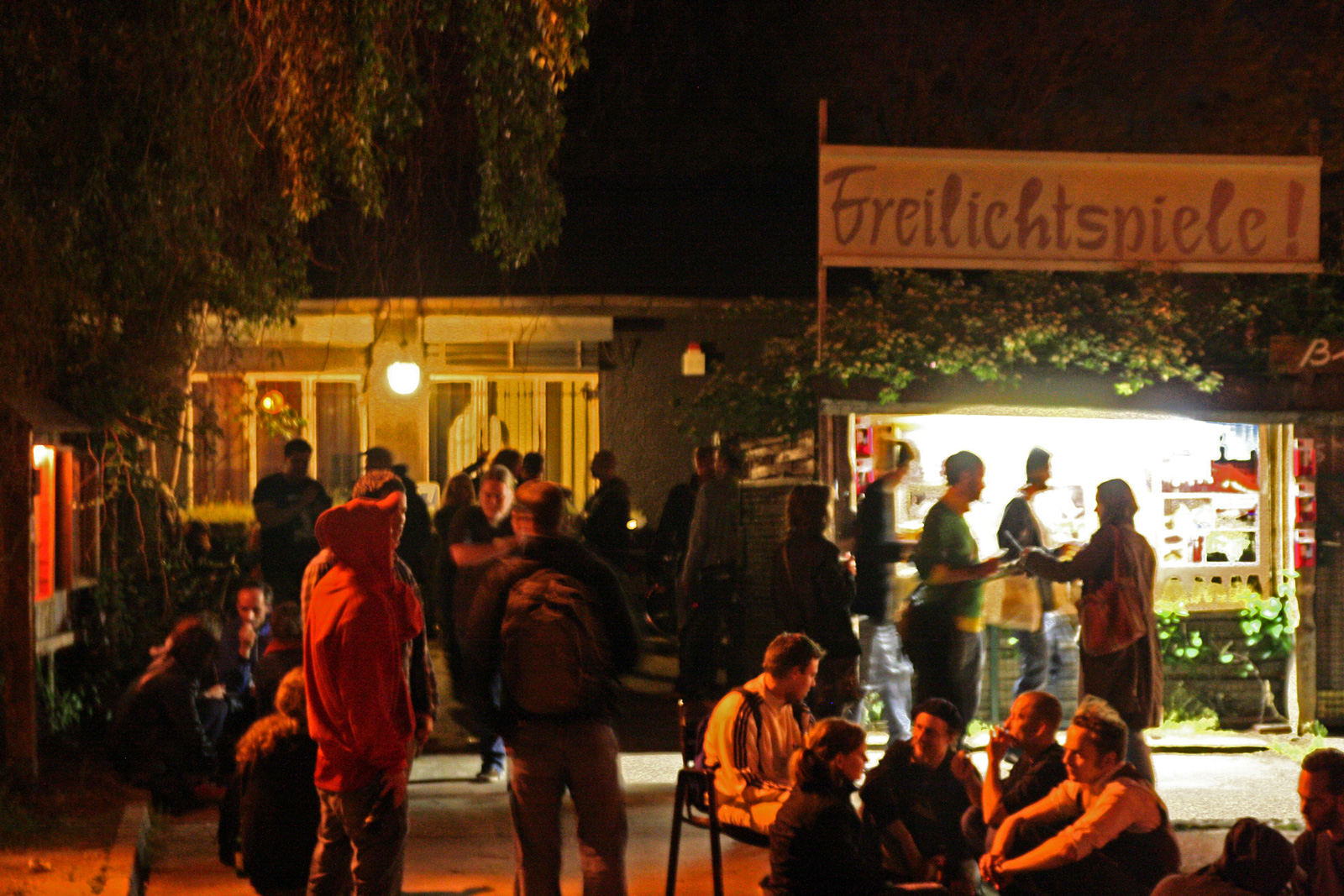 ZUKUNFT am Ostkreuz - Eingangsbereich in der Laskerstraße - Open Air Eröffnungsfeier Walpurgisnacht 2014